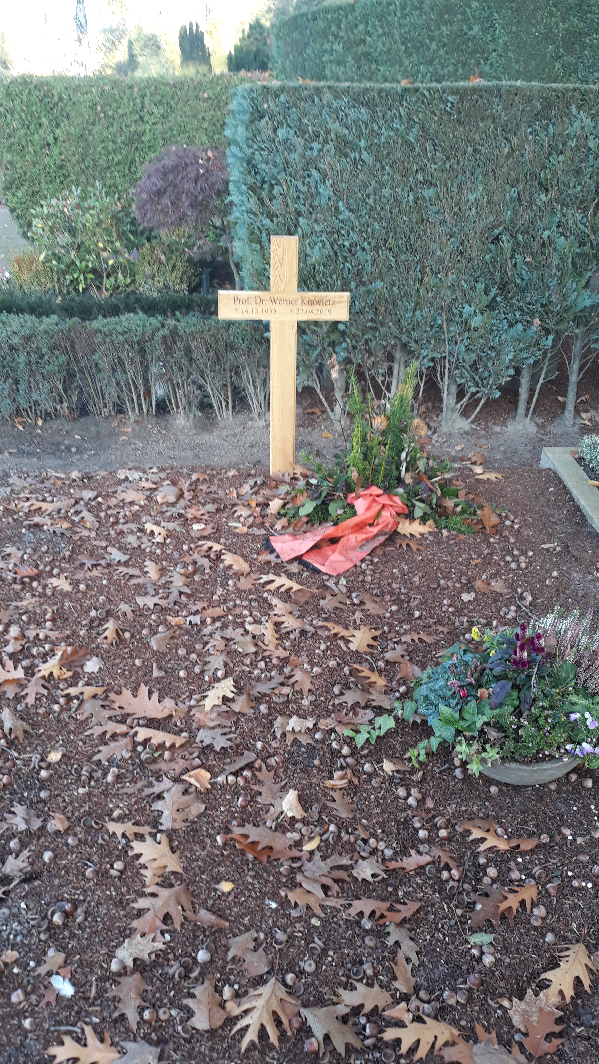 Das Grab des deutschen Juristen, Rechtsphilosophen und Hochshullehrers Werner Krawietz auf dem Zentralfriedhof Münster.